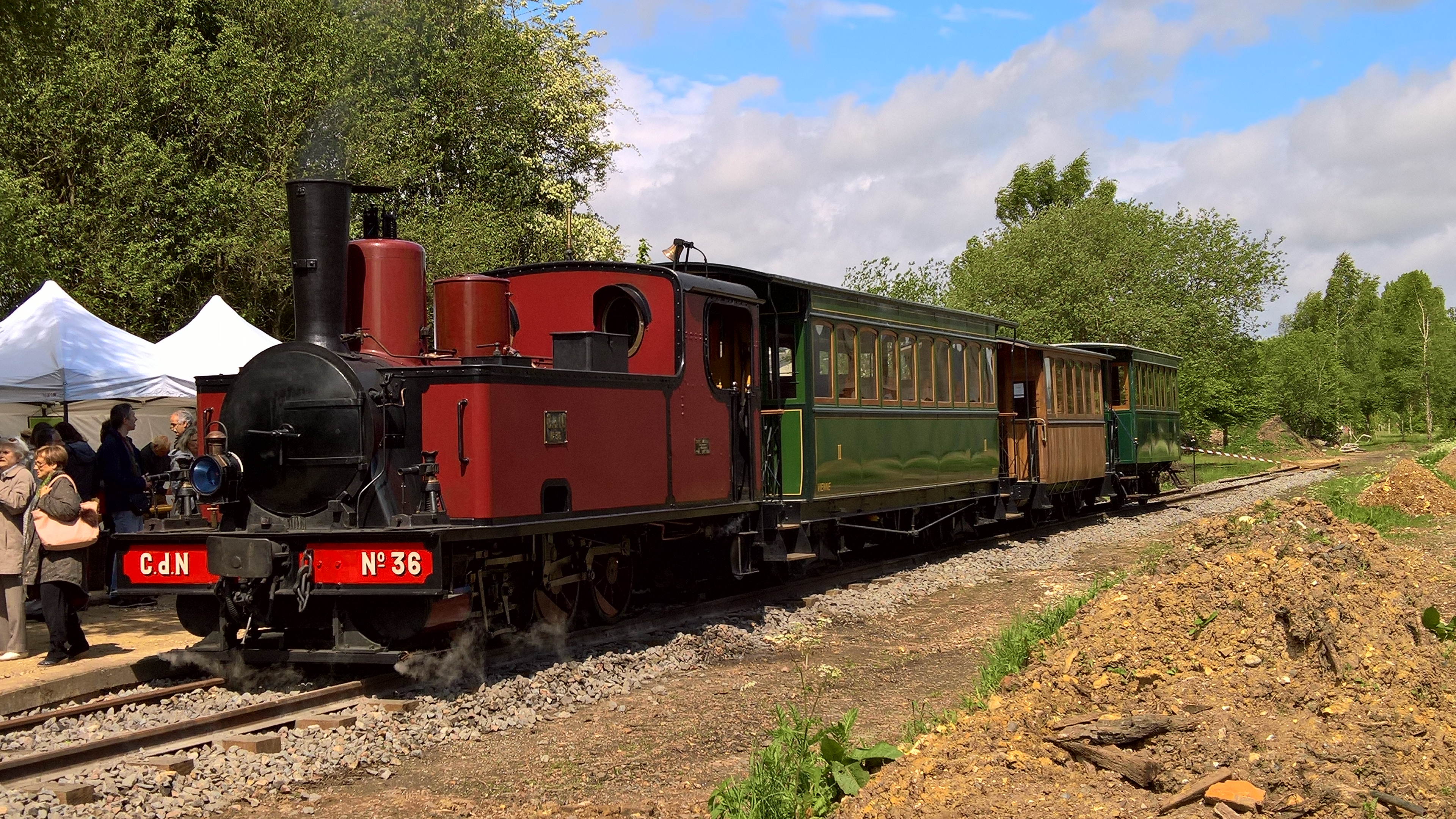 Rame du TVB 2017, pour le train des donateurs : Locomotive Corpet-Louvet CDN 36, Voiture n° BB7, (1913) des Voies ferrées économiques du Poitouvoiture n° B 328, ANF (1892), des Chemins de fer de la Banlieue de Reims (CBR) Voiture n° ABf7, Horme et Buire (1895), des Tramways des Deux-Sèvres (TDS).